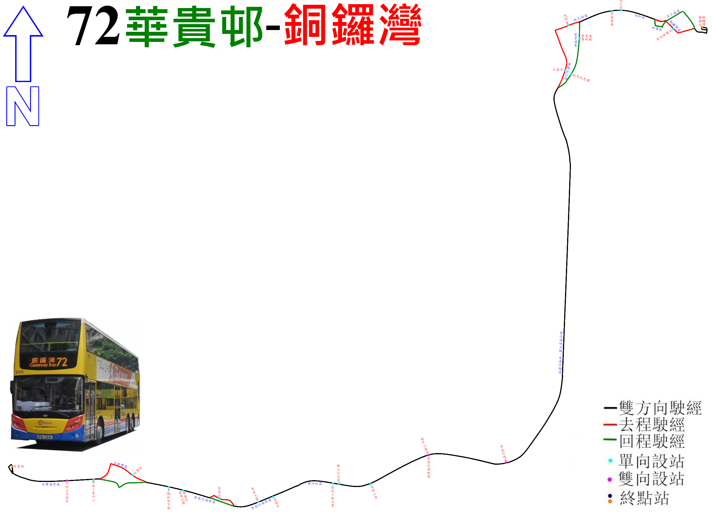 中文（香港）: 城巴72線的走線圖